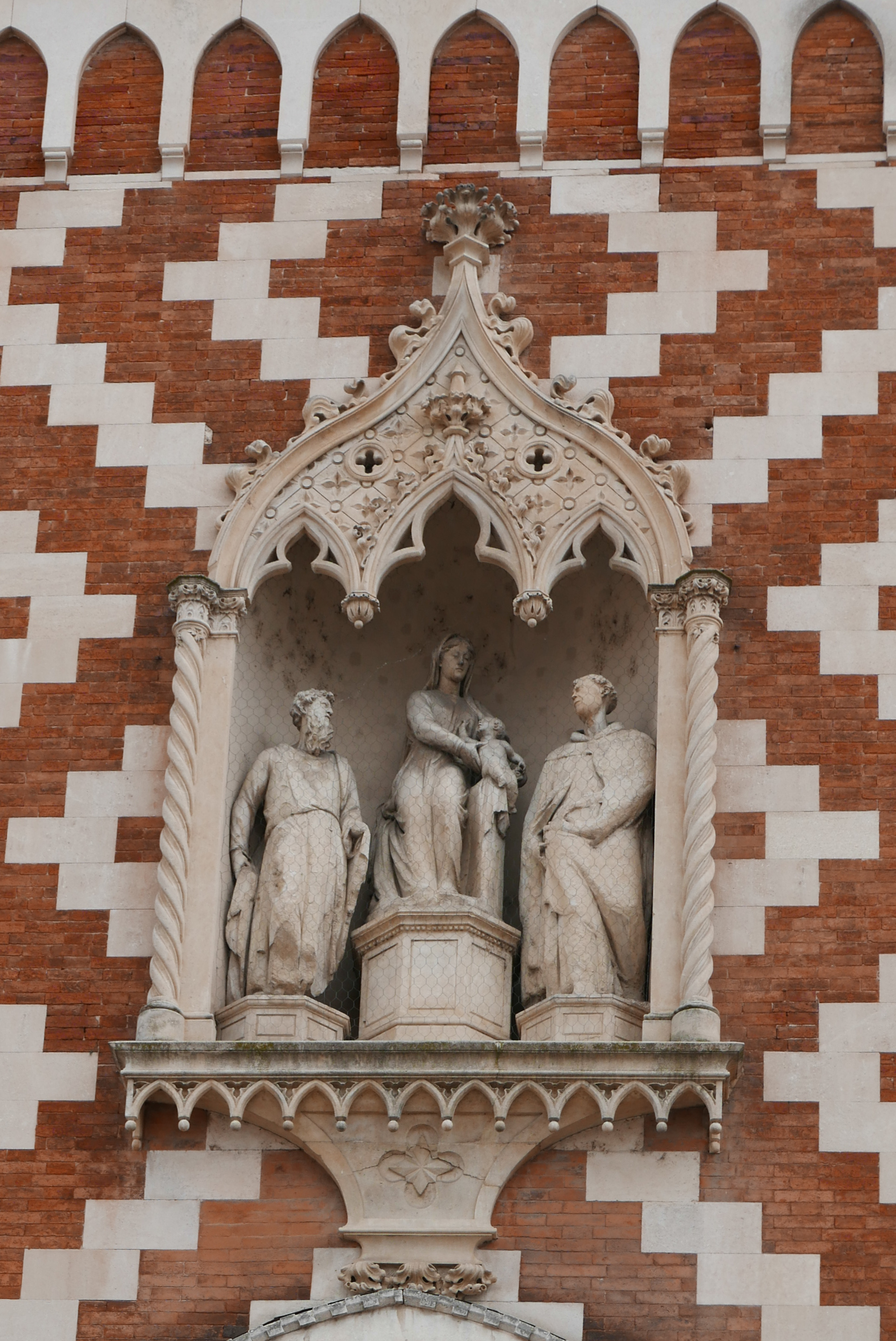 Nicchia